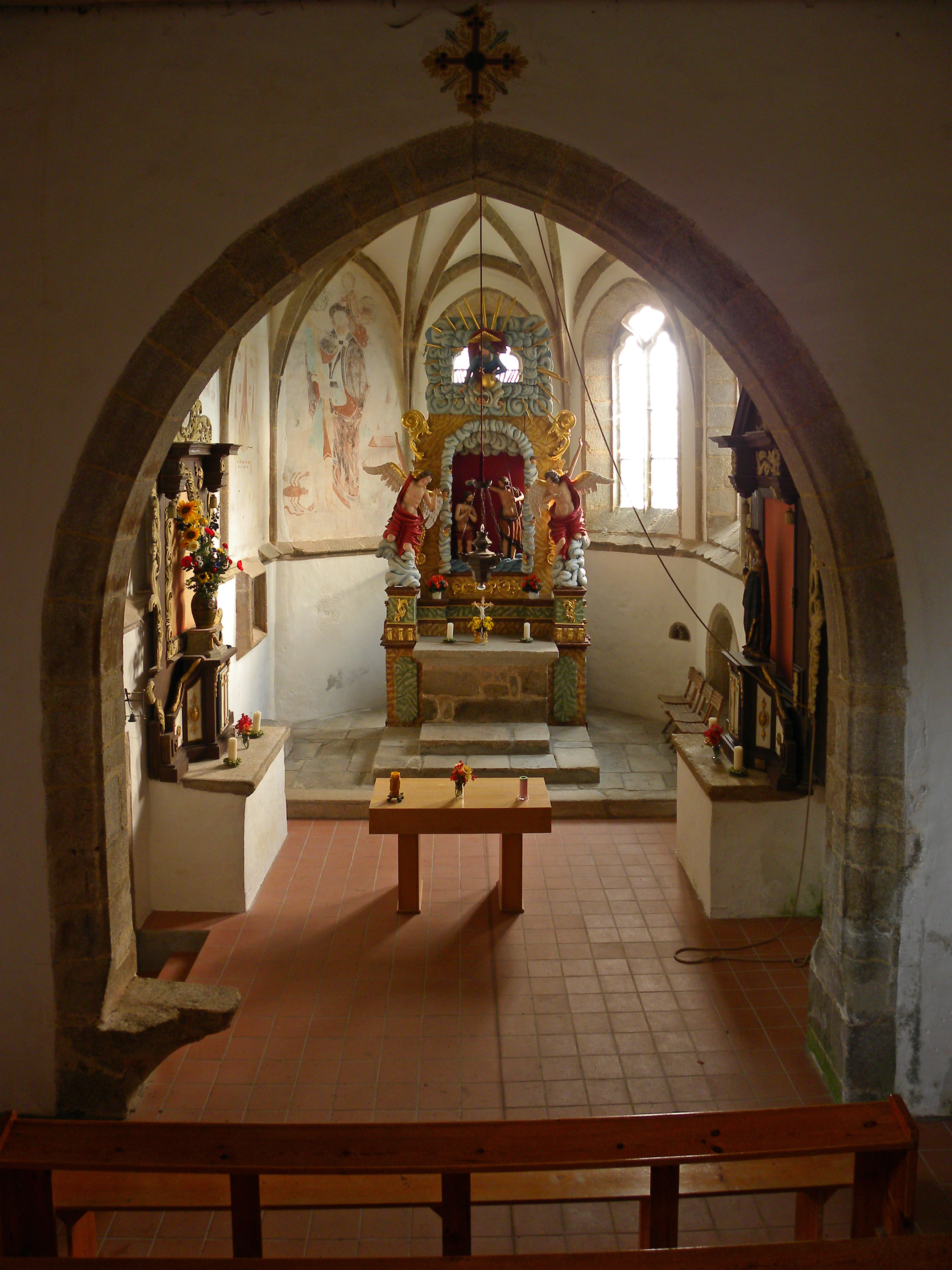 Kath. Filialkirche hl. Johannes der Täufer, ehem. Burg Hadmarsteine